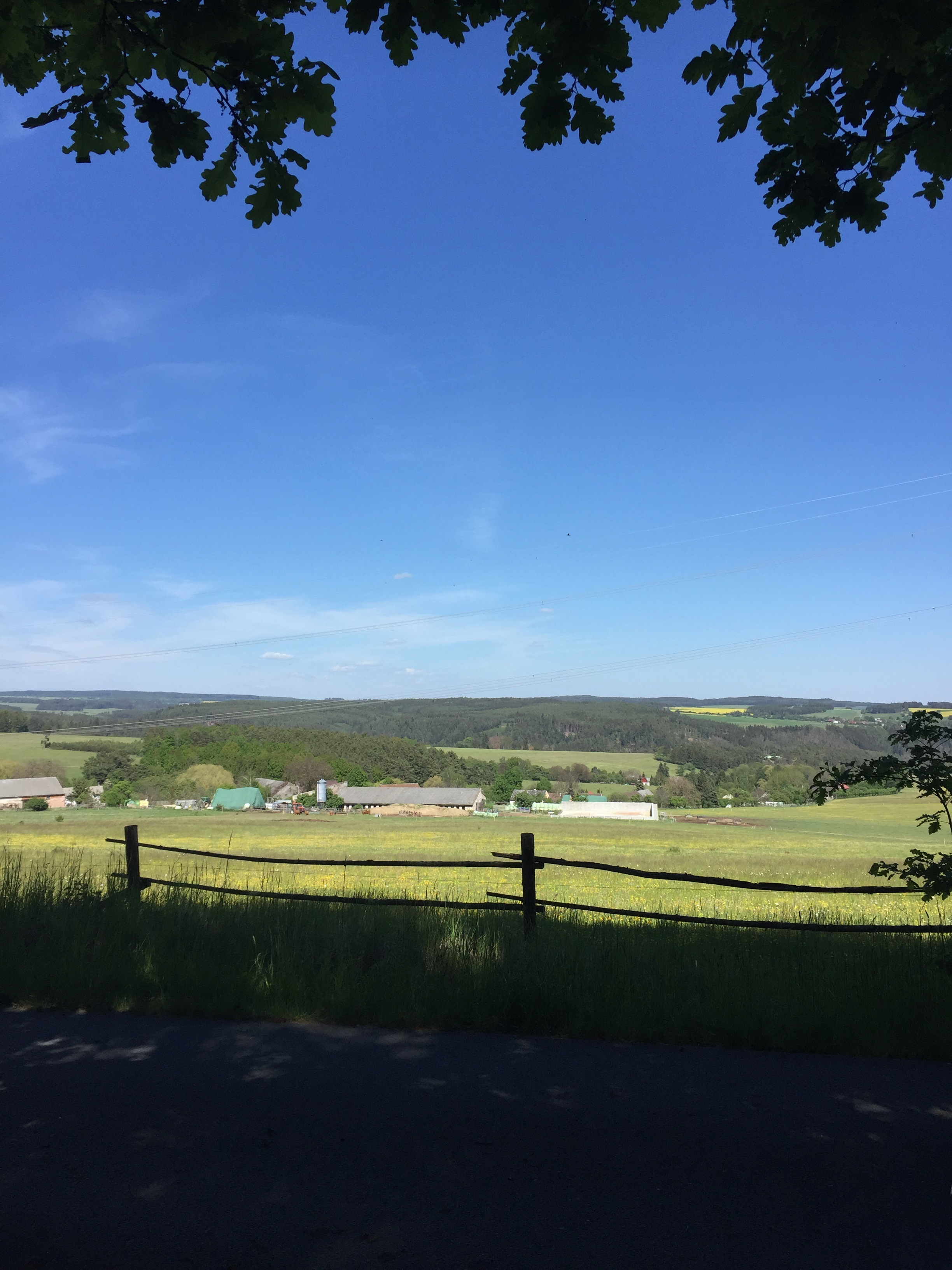 Pohled na Dlouhé Hradiště z lavičky J. Pantáka